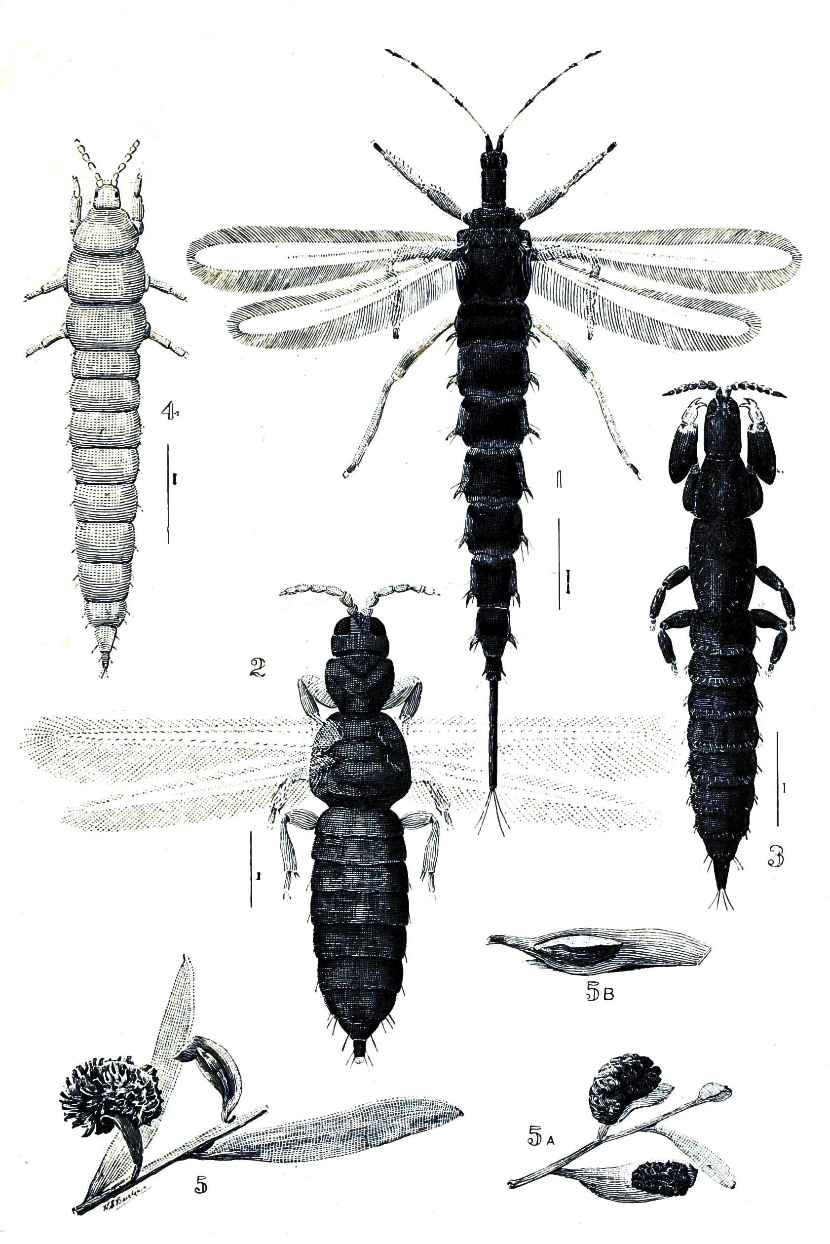 Plate XXXVII.— THYSANOPTERA. X